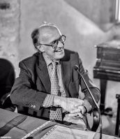 Mario Andrea Rigoni all'Università di Padova 2017